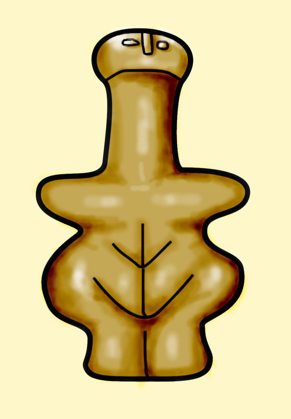 Idol aus Lemba, Zypern, eigene Umzeichnung